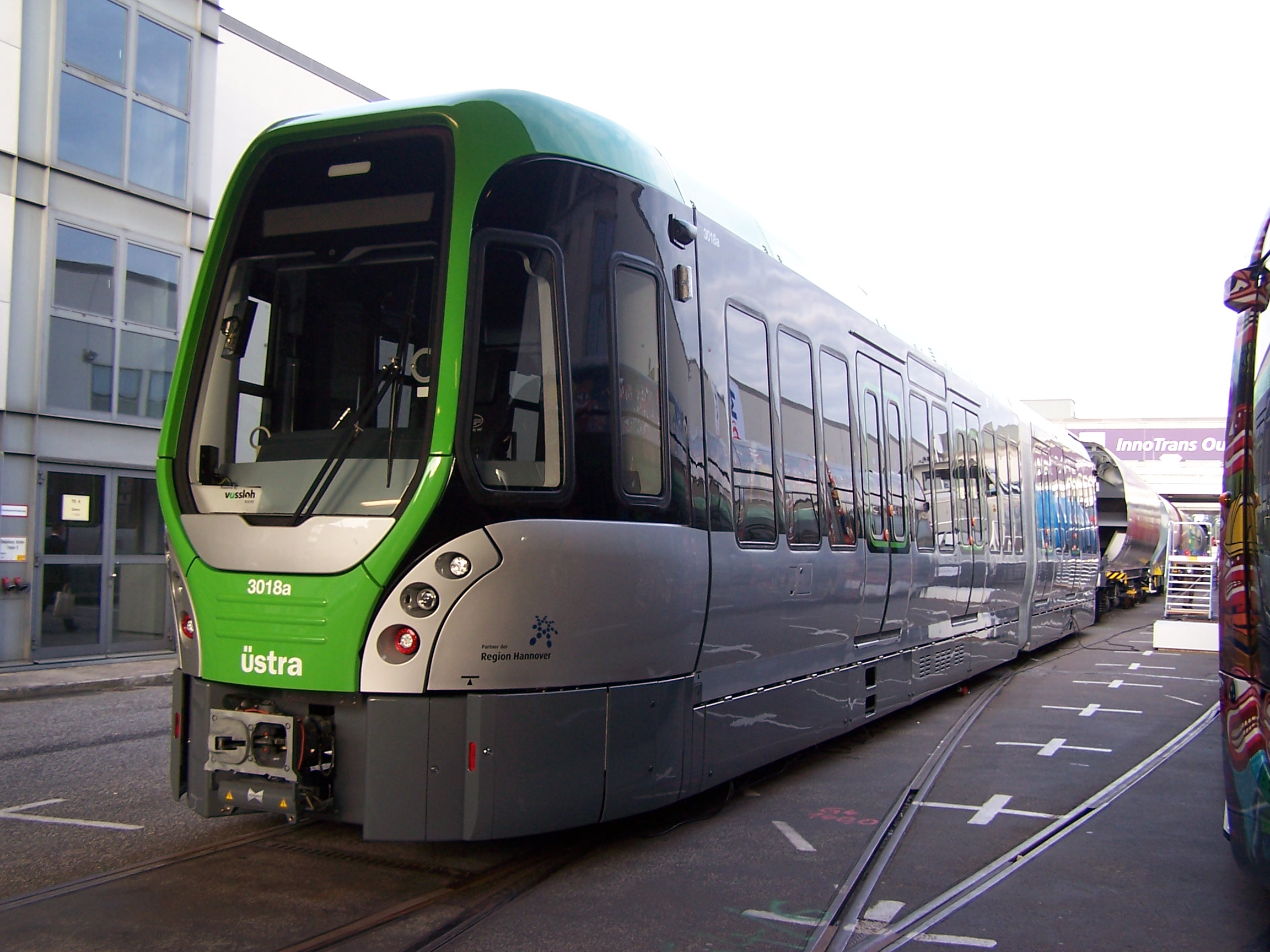 Üstra TW 3018a auf der Innotrans 2014.